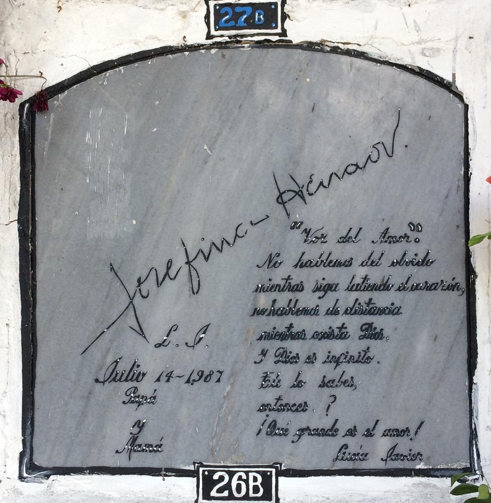 Tumba de la poetisa colombiana Lucía Javier (1924-1987)